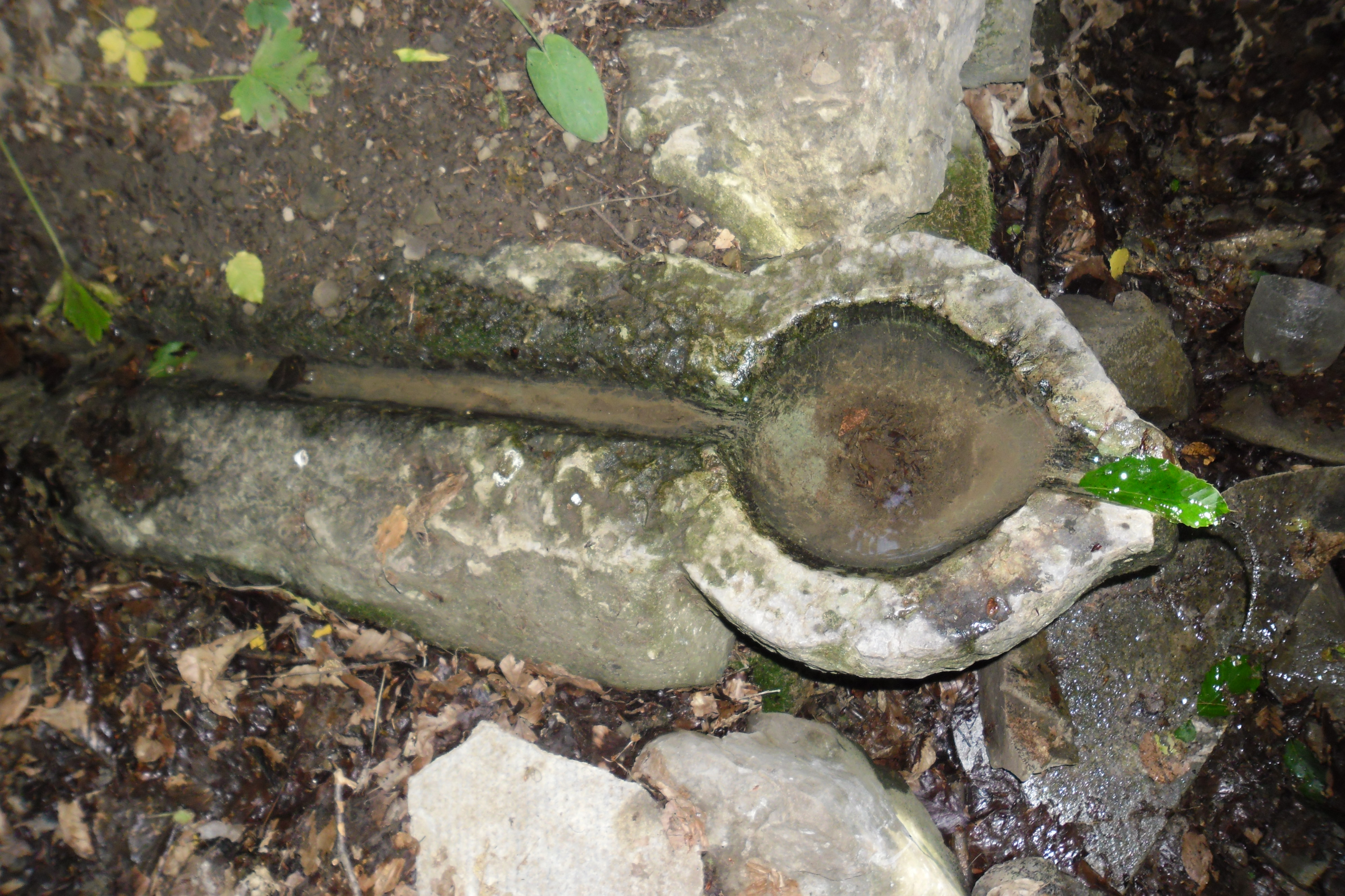 Фото